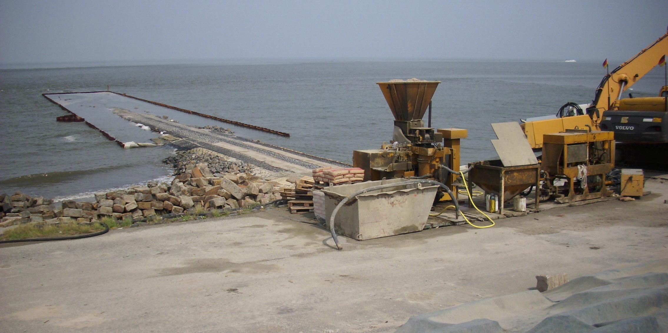 Buhnenbaumaßnahme des Küstenschutzes auf Baltrum